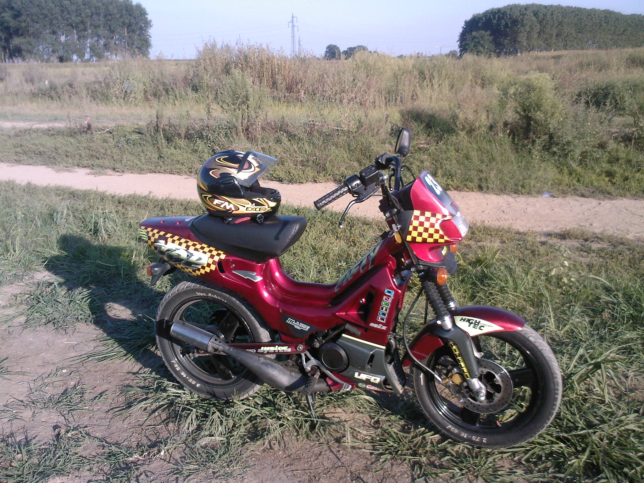 Un esemplare totalmente originale e ben conservato del glorioso "Tubone" Fifty 50